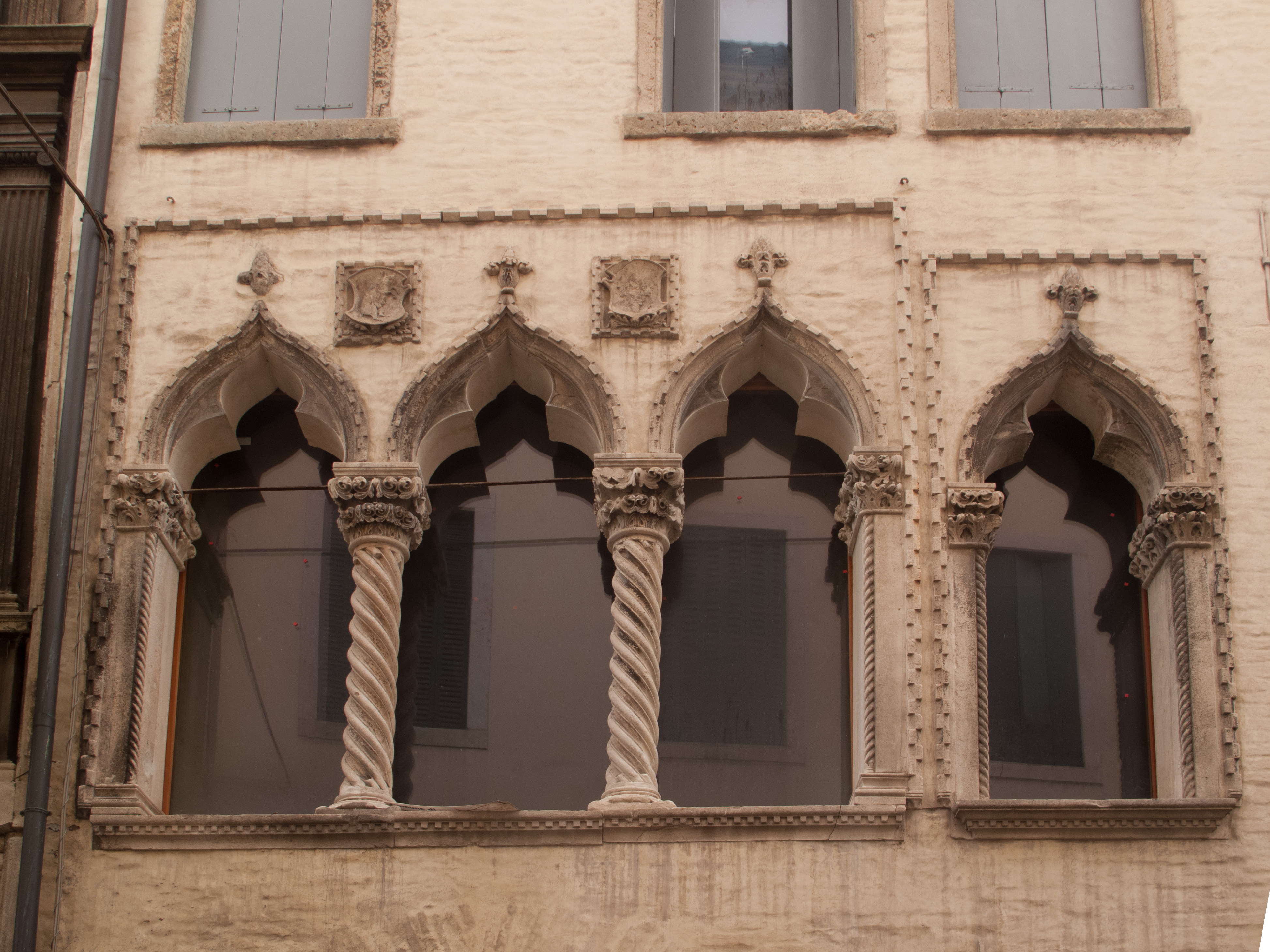 Vicenza - Palazzo Scroffa- Trifora e monofora